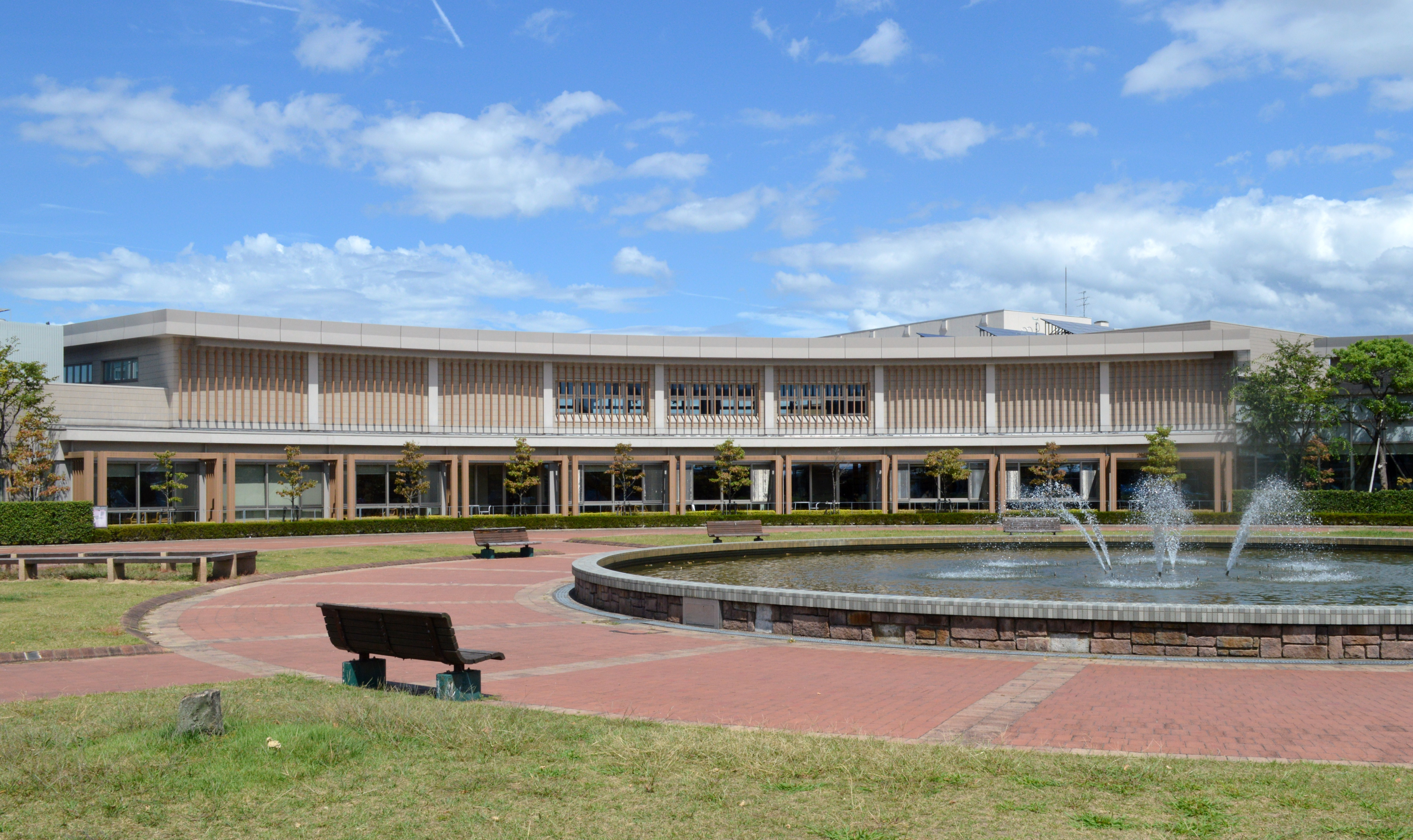 越前市立図書館のひとつ、越前市中央図書館。